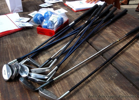 Oprema za igru